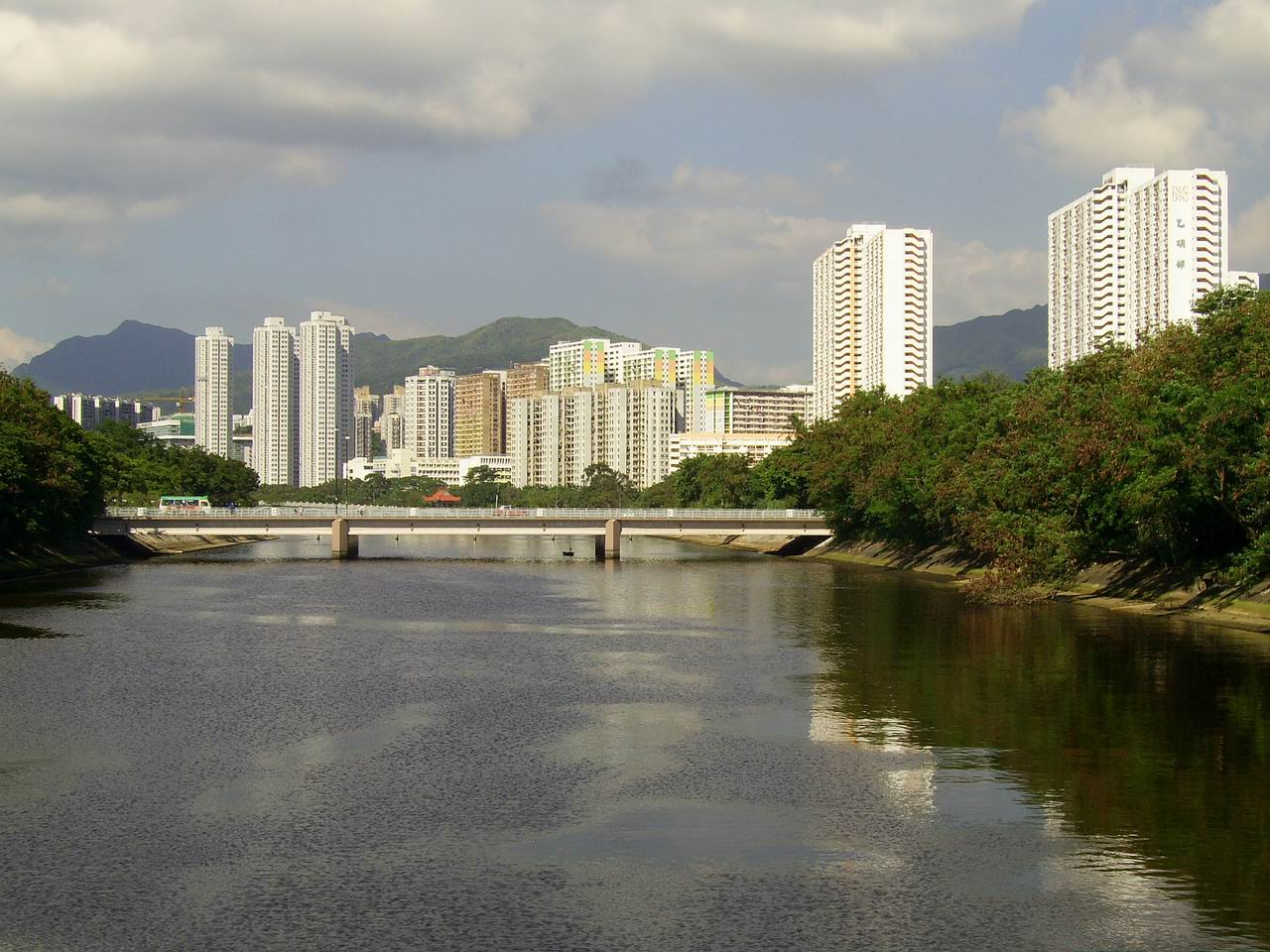 中文（香港）: 沙田獅子橋